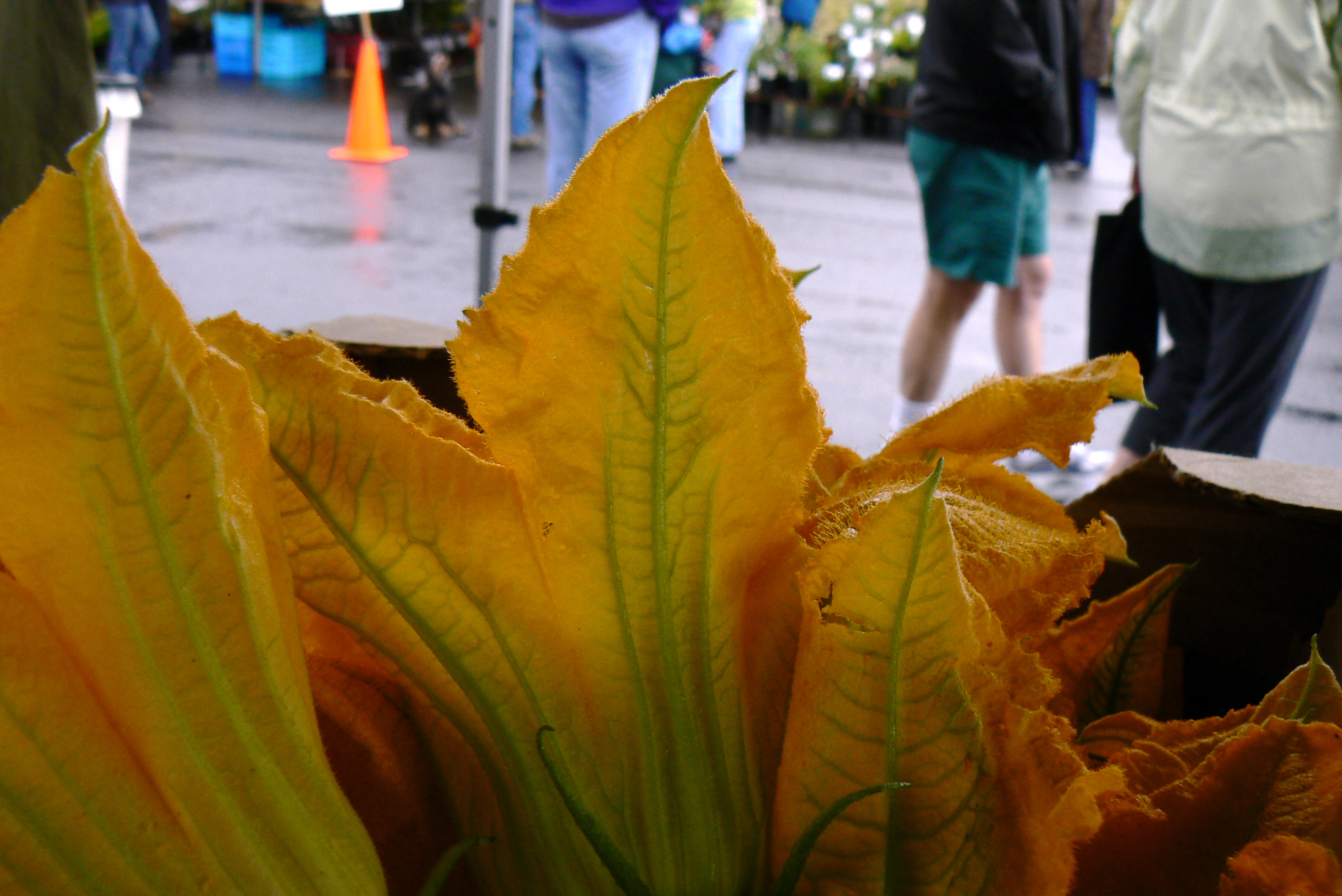 Zucchini flowers. Fleurs de courgette sur le marché.